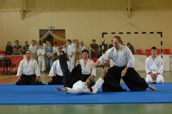 Показательное выступление Федерации Айкидо Марий Эл, ФОК Спартак, Йошкар-Ола